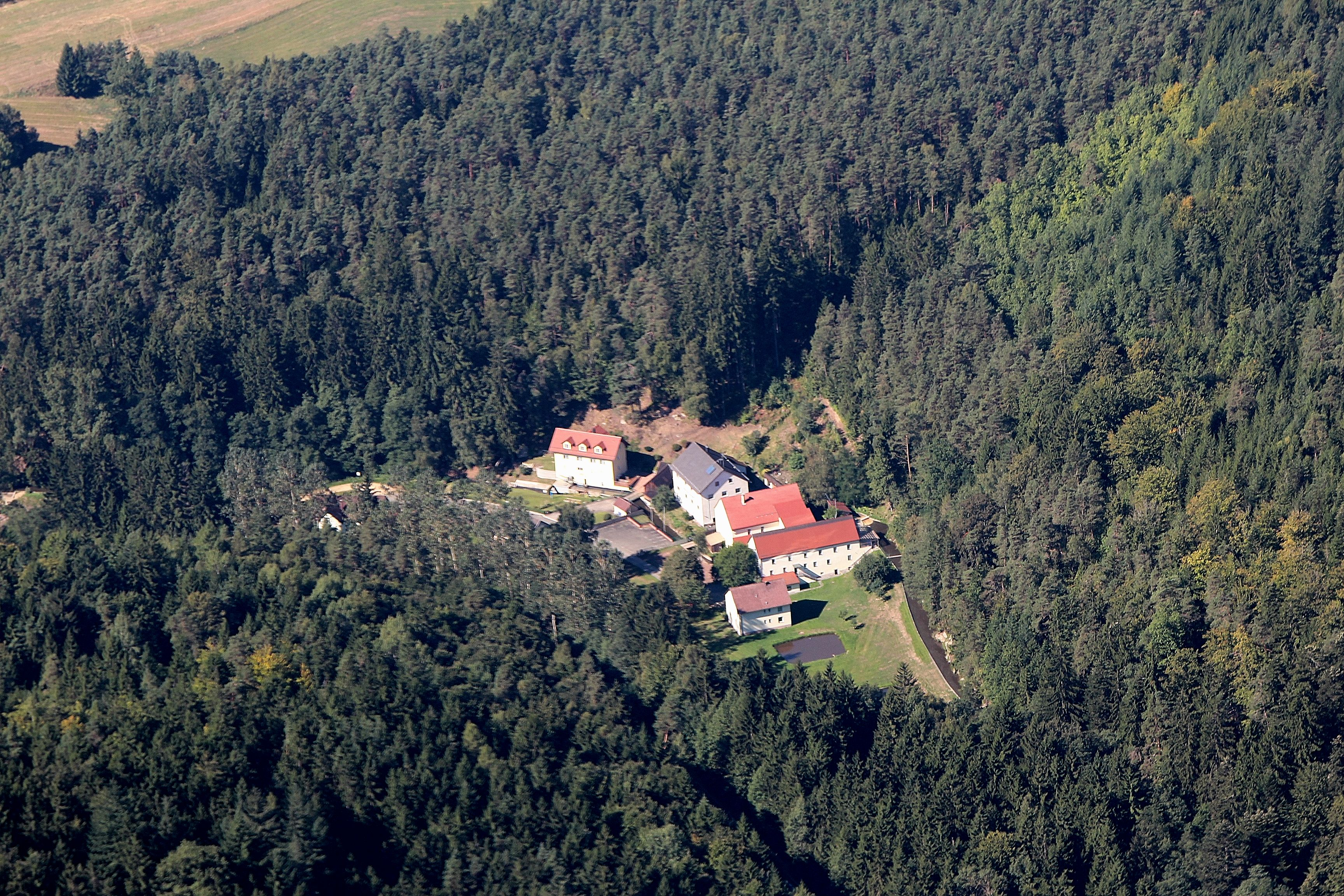 Warnthal; Neunburg vorm Wald, Landkreis Schwandorf, Oberpfalz, Bayern